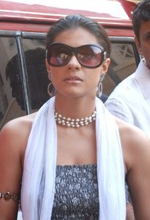 Ajay Devgn dan Kajol di pemutaran istimewa dari film mereka U Me Aur Hum pada 2008